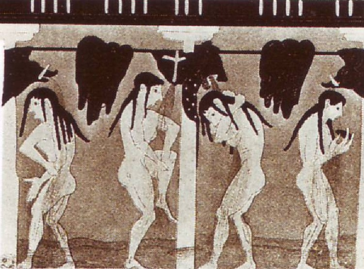 Detalle del dibujo con figuras duchándose en un vasija griega griega (hacia el año 600 a. C.)